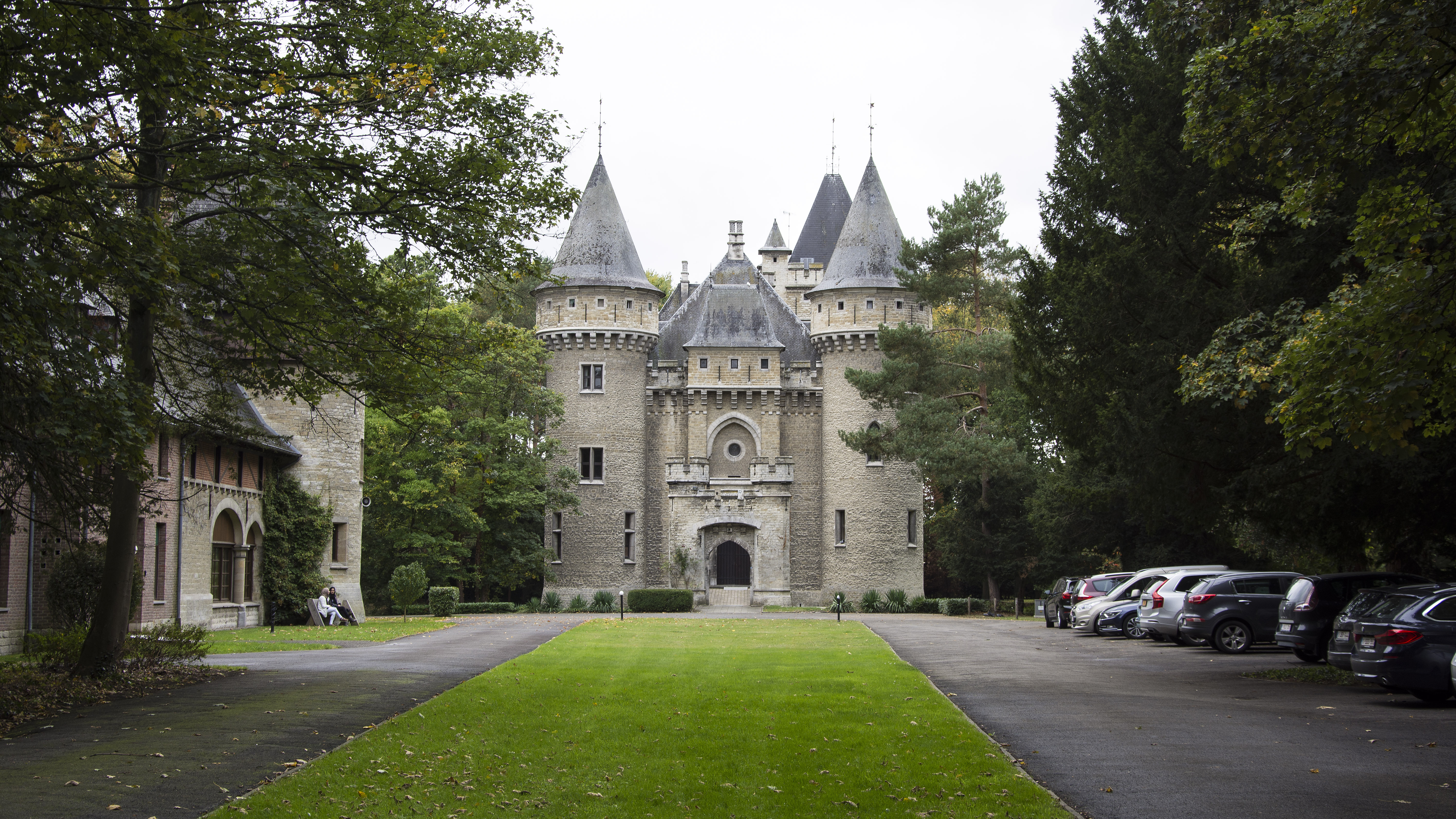 Bonheiden Kasteel Zellaer (2515) oostgevel 28-09-2019 15-25-37 This photo of immovable heritage has been taken in the Flemish Region